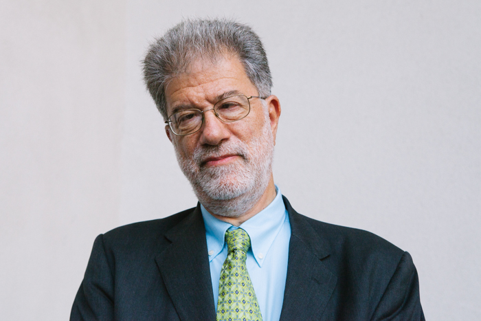 Eduardo Engel, economista chileno.